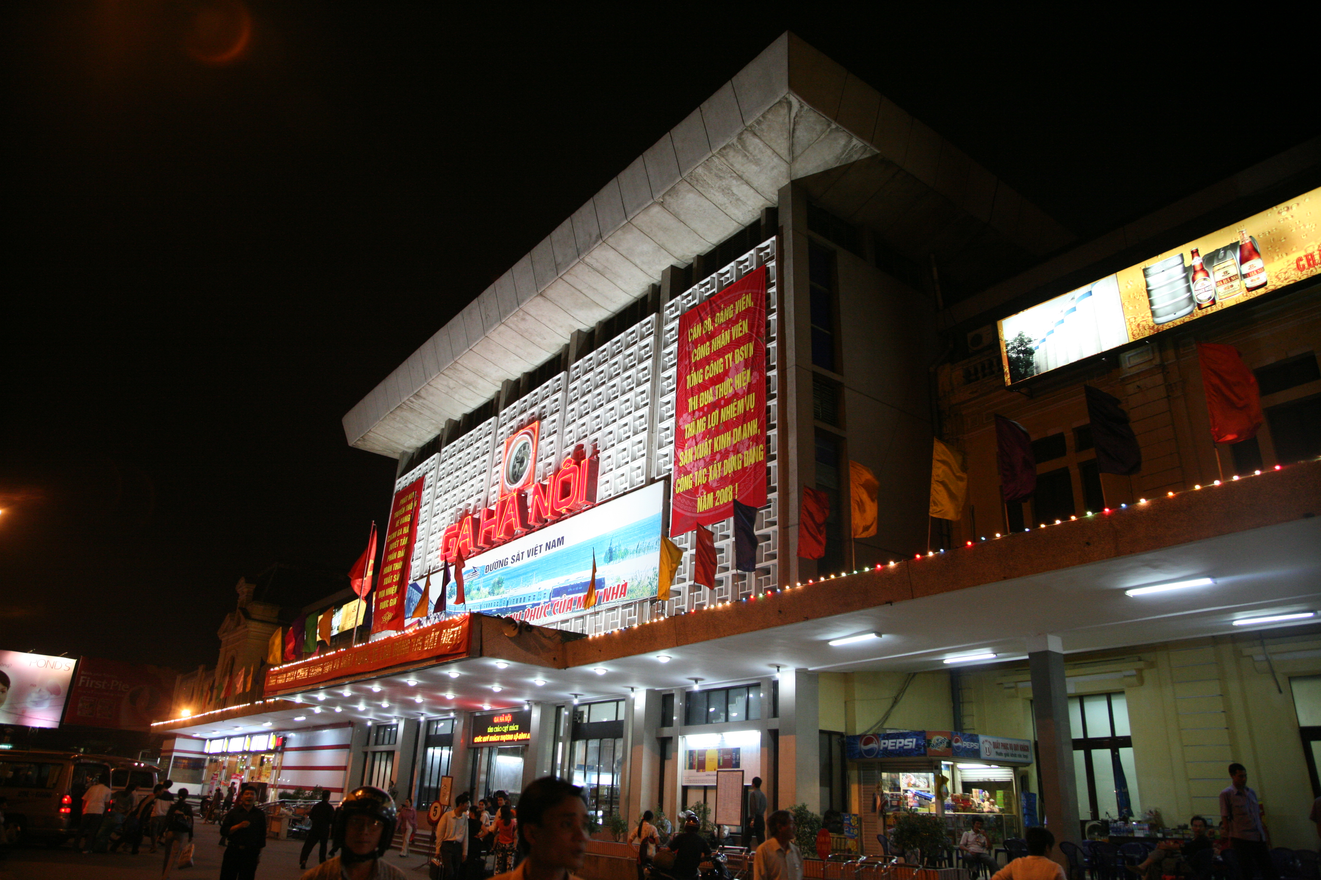 Hanoi Station night view